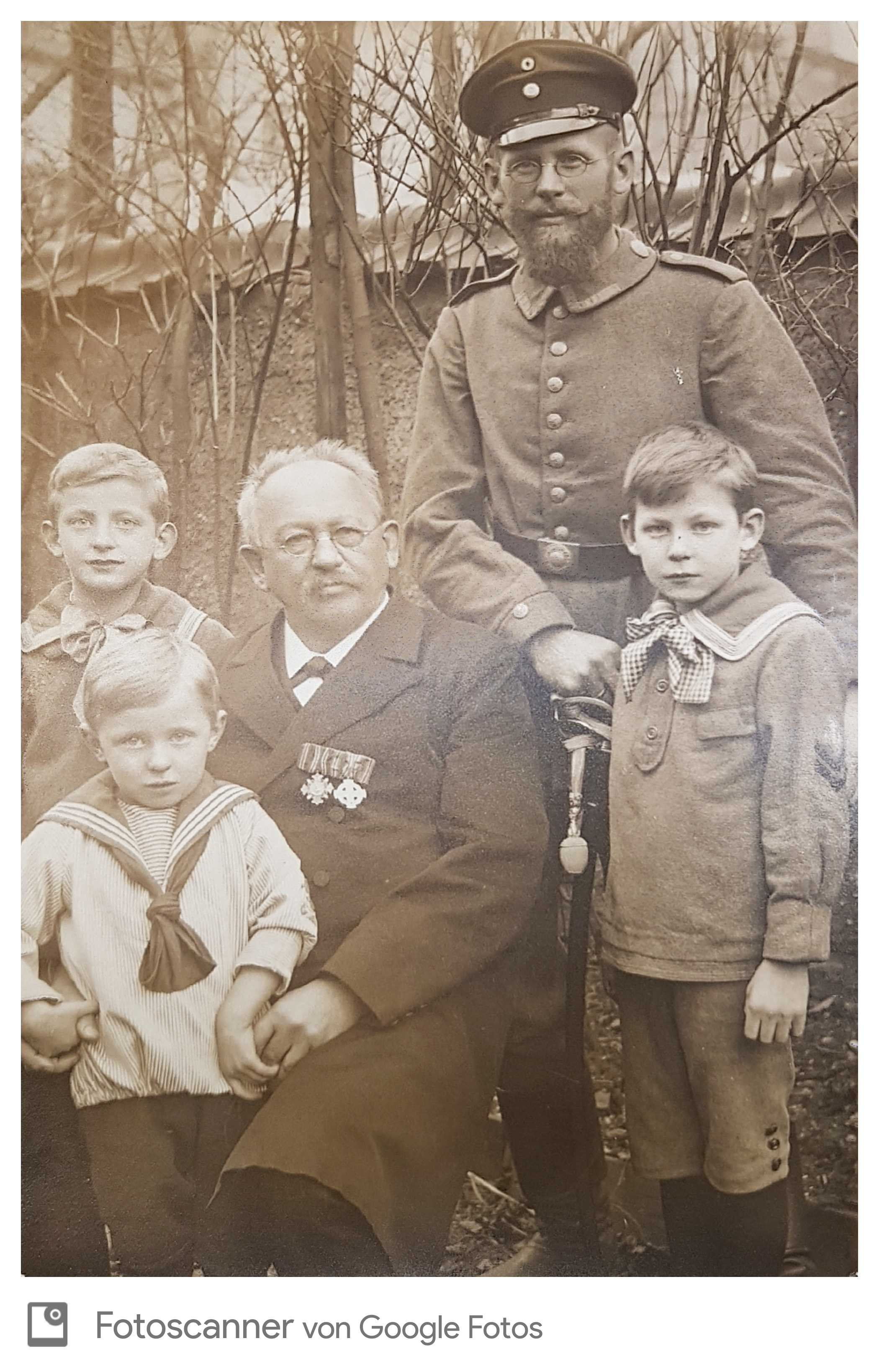 Joseph Elsner Senior. (links) mit Joseph Elsner Junior (rechts) während des Ersten Weltkriegs.